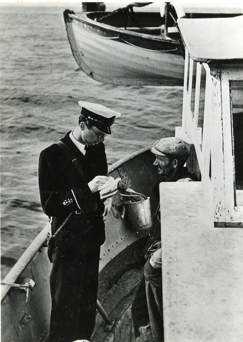 Fänrik vid Sveriges Frivilliga Motorbåtskår (nuvarande Sjövärnskåren) utför visitering som del av sjöfartskontroll under andra världskrigets början.